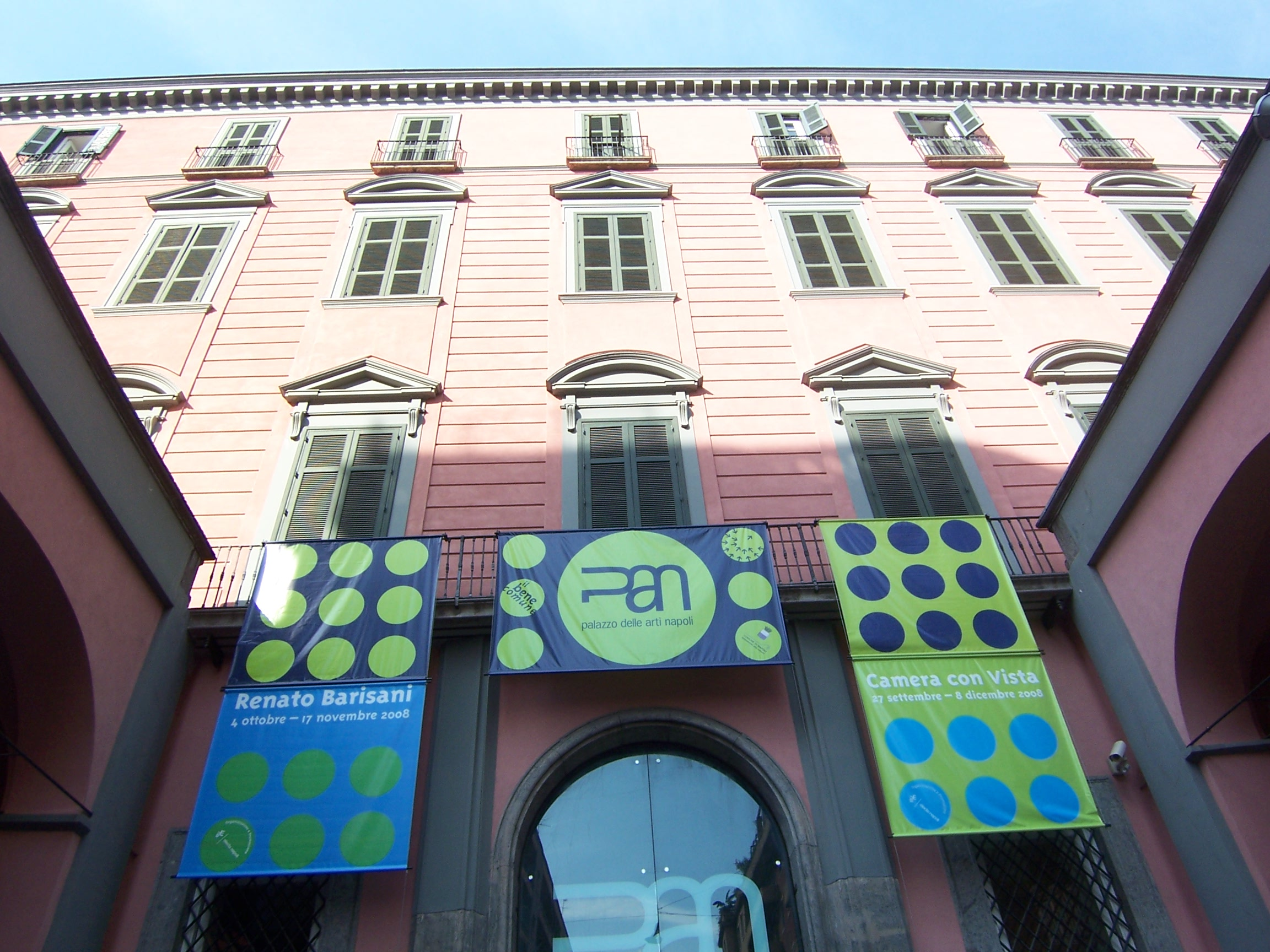 Facciata del Palazzo Carafa di Roccella a Napoli